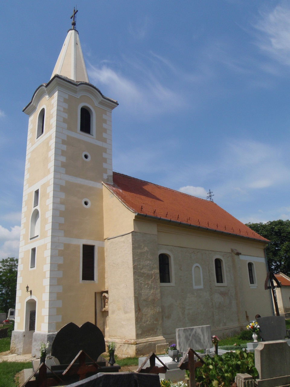 Heiliger Georg Kirche in Dozmat